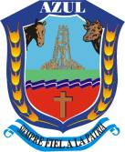 Coat of arms of Azul Partido, Buenos Aires Province.